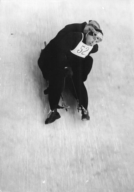 Zentralbild Wlocka-Schaar 8.2.1954-Rodelmeisterschaften der Deutschen Demokratischen Republik vom 3.-7.2.1954 in Oberhof-Die Meisterschaften im Gemischten Doppel wurden am 7.2.1954 auf der Wadsberg-Bobbahn ausgetragen. UBz: Der mehrmalige Europa- und deutsche Meister Walter Feist, DDR-Meister im Männer-Einer 1954, mit seiner Partnerin Kinze-Tietze in der Schaukurve.